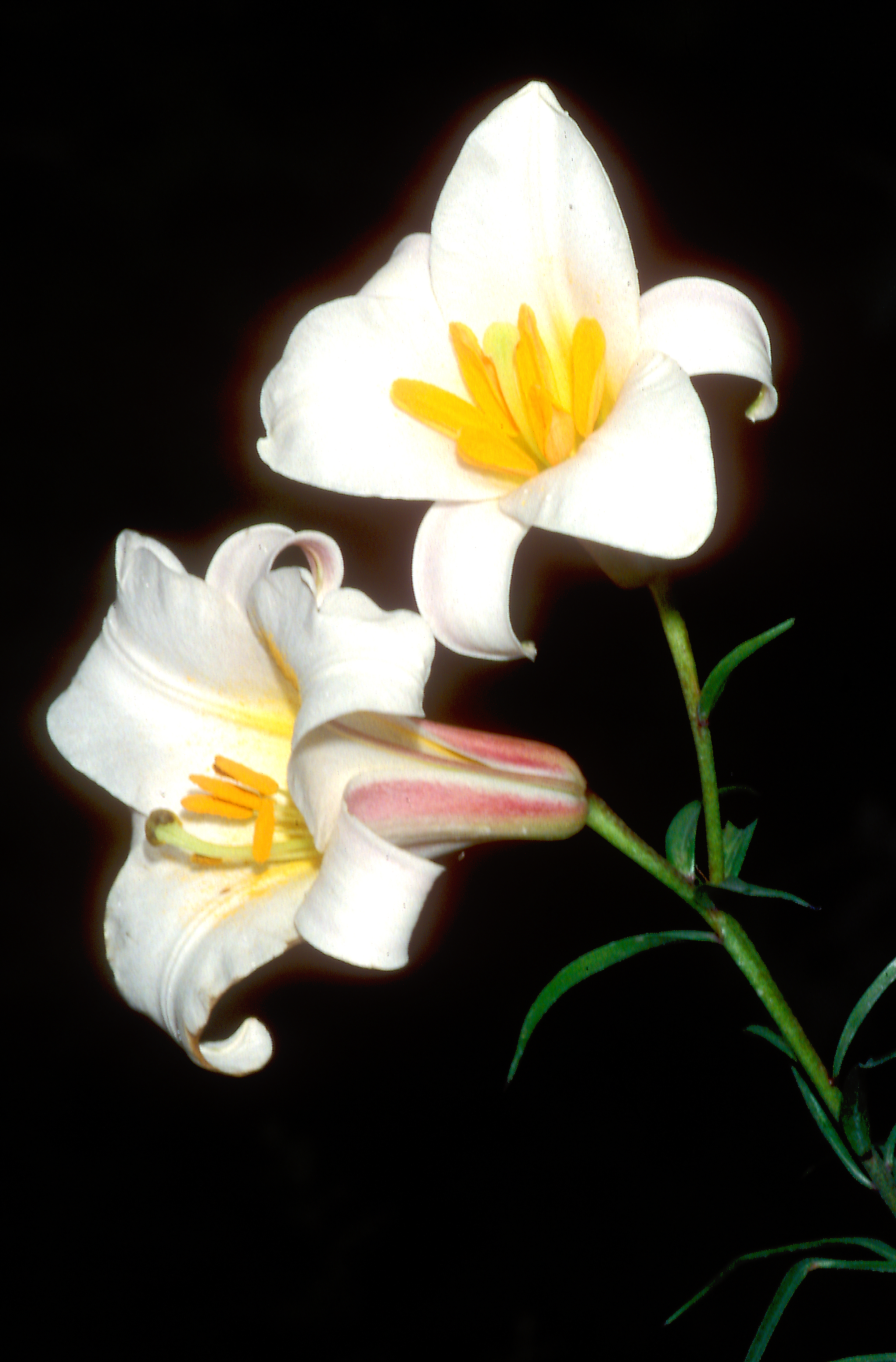 Lilium regale in habitat, Wolong, Sichuan, China